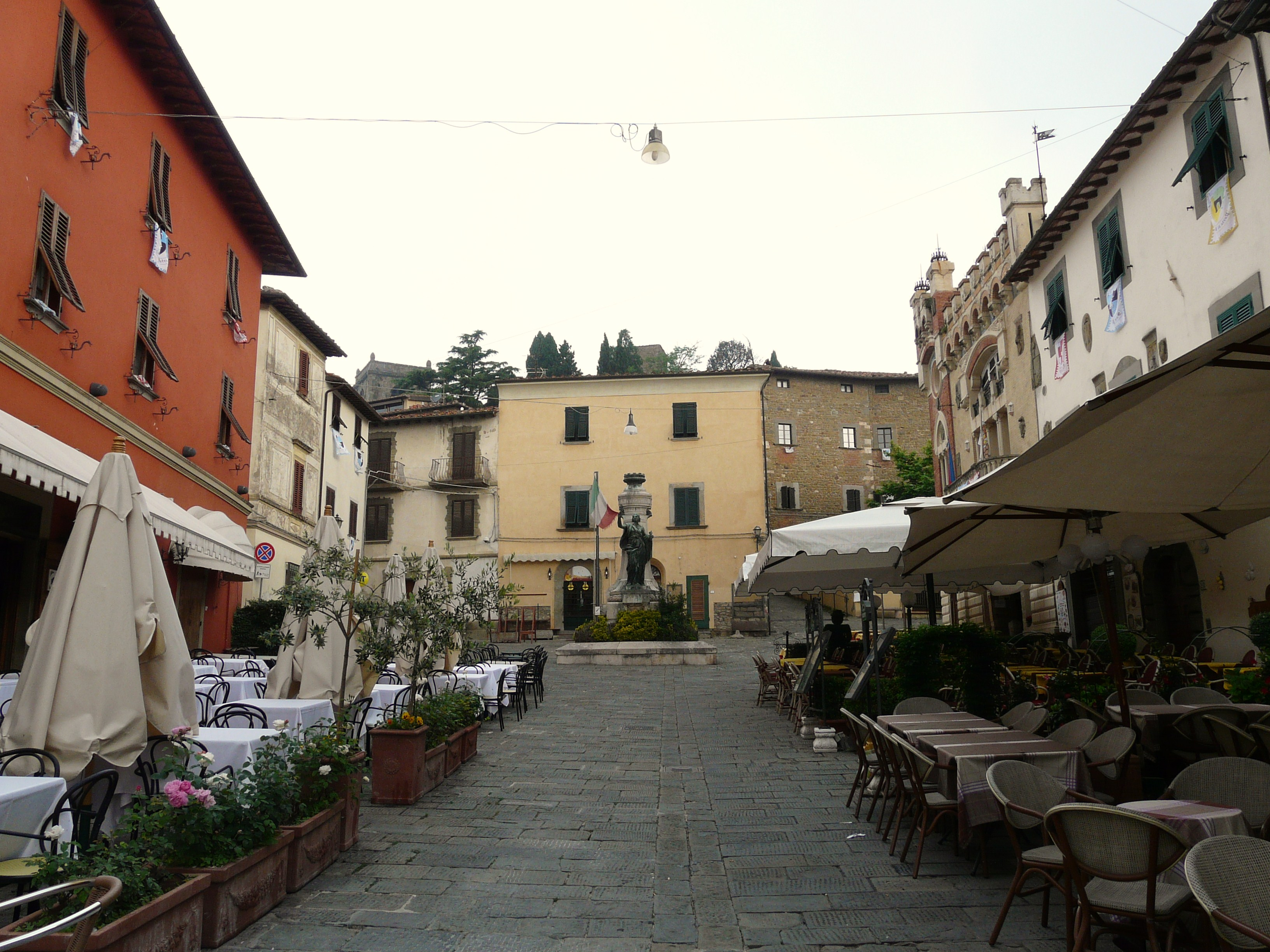 Frazione di Montecatini Alto, Comune di Montecatini Terme, Toscana, Italia